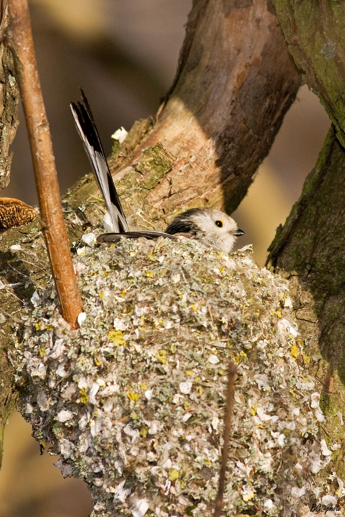 Aegithalos caudatus on nest, Jakubovské rybníky, Slovakia